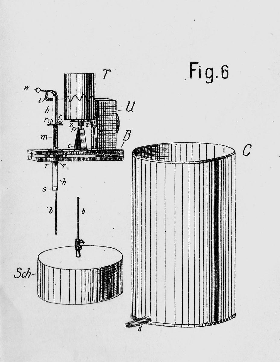 Portabler Limnimeter, 1903